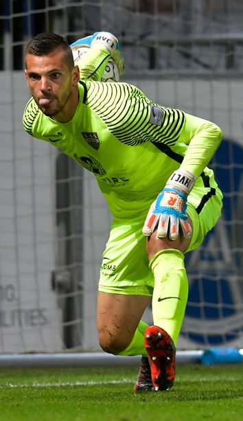 Hendrik Van Crombrugge (Eupen-Rupel Boom)